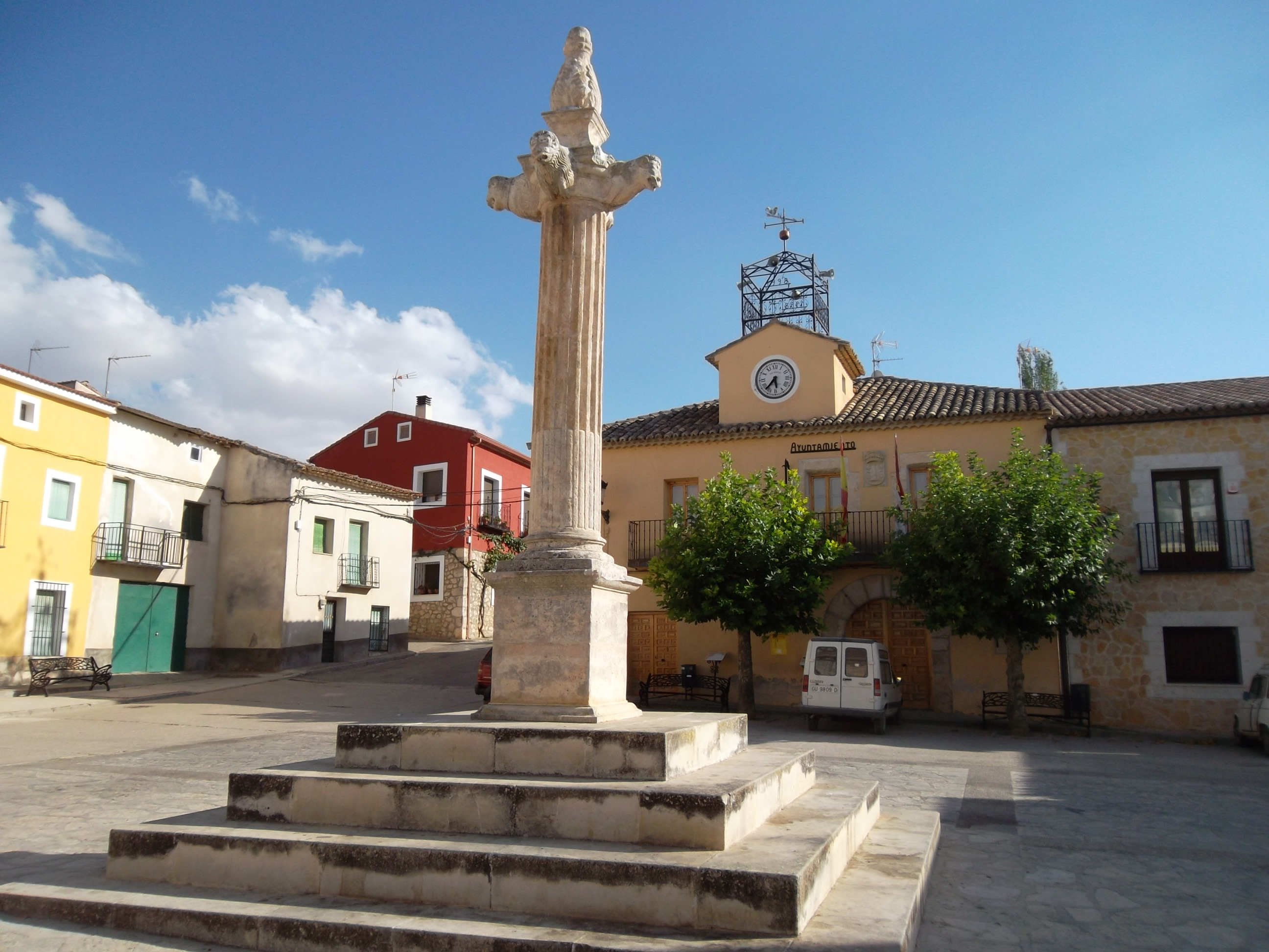 Valdeavellano - La Picota o Rollo del siglo XVI, se eleva en el centro de la plaza María Cristina.